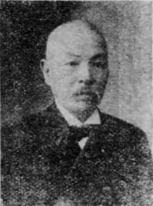 Tomohiro Ishii(石井倶寛)